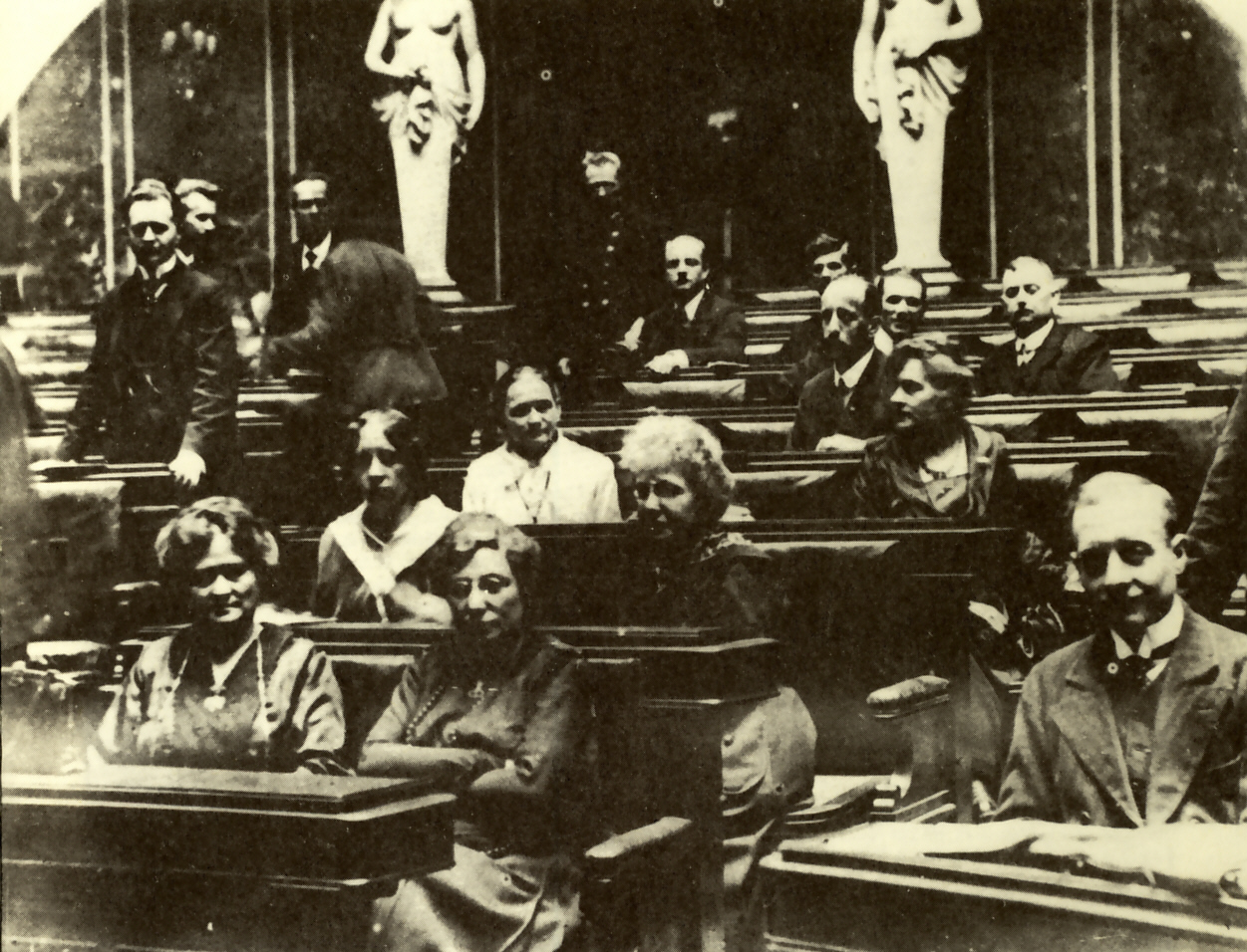 Die ersten weiblichen sozialdemokratischen Abgeordneten der Verfassunggebenden Nationalversammlung am 4. März 1919. 1. Reihe: Adelheid Popp, Anna Boschek 2. Reihe: Gabriele Proft, Therese Schlesinger (geb. Eckstein) 3. Reihe: Marie Tusch, Amalie Seidel